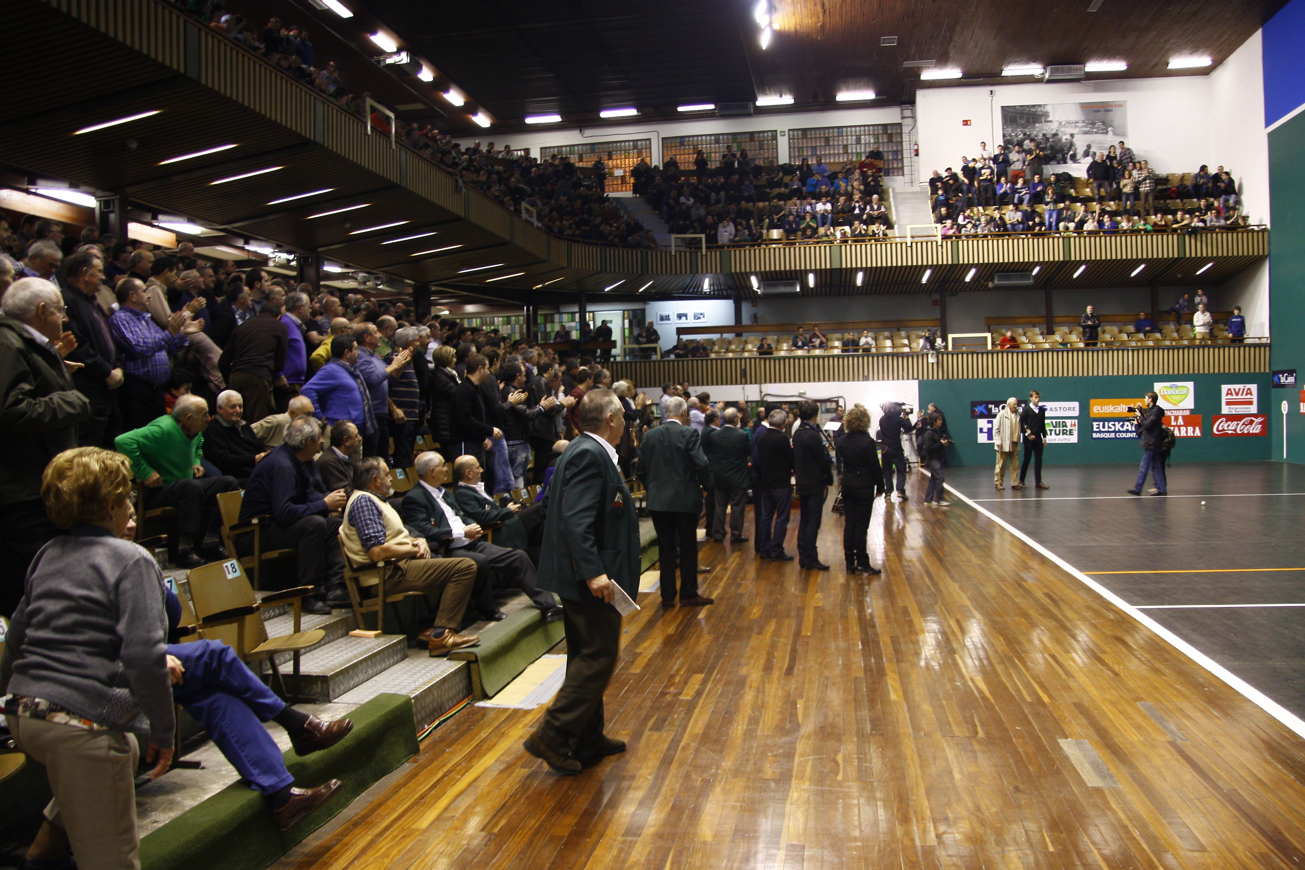 Eibarko Astelena pilotalekuaren harmailak, Miguel Gallastegui pilotariari Eibarko Astelena pilotalekuan egindako omenaldian.